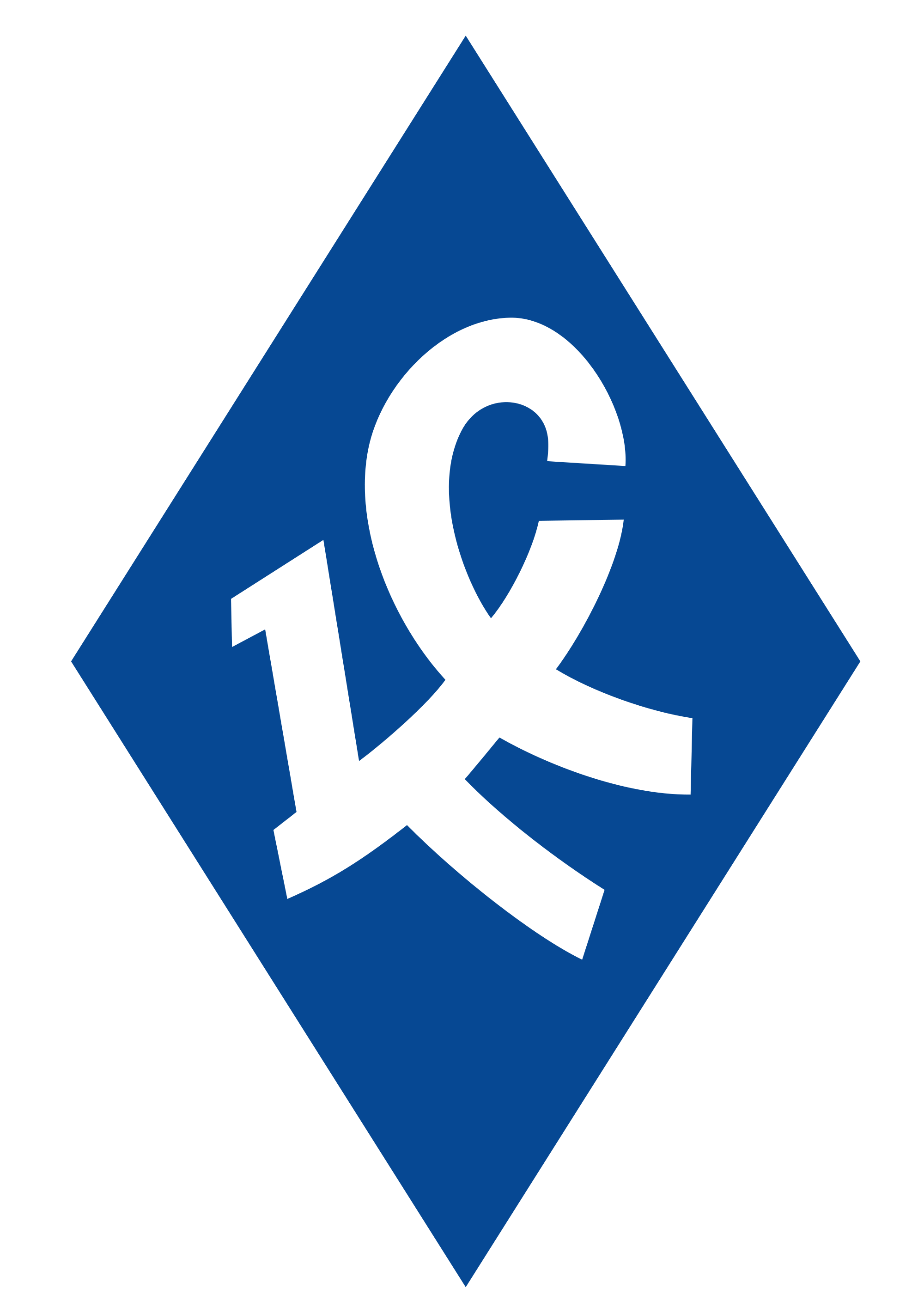 Эмблема ФК Крылья Советов Самара